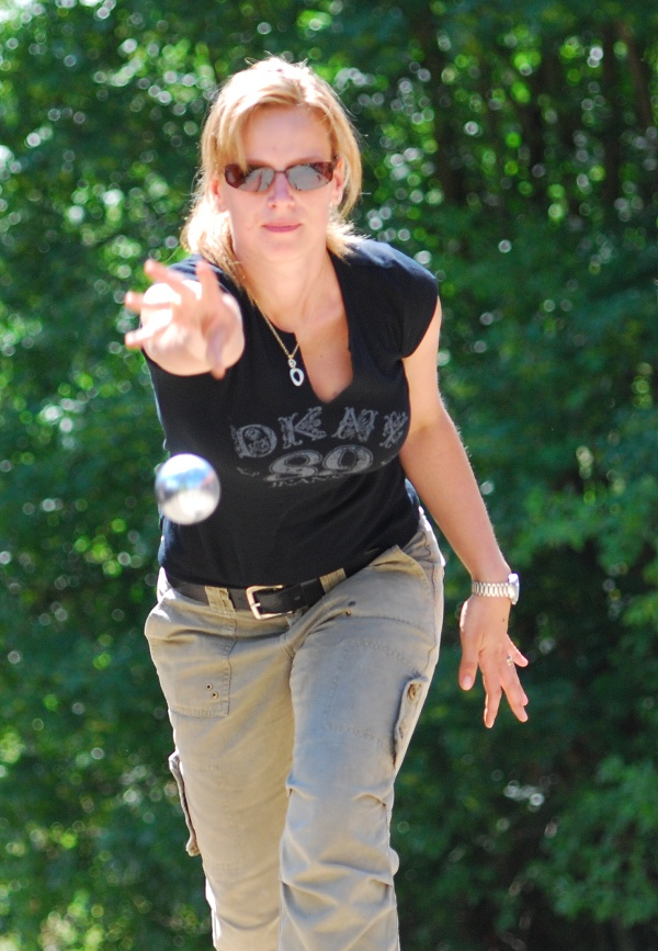 Pétanque Player